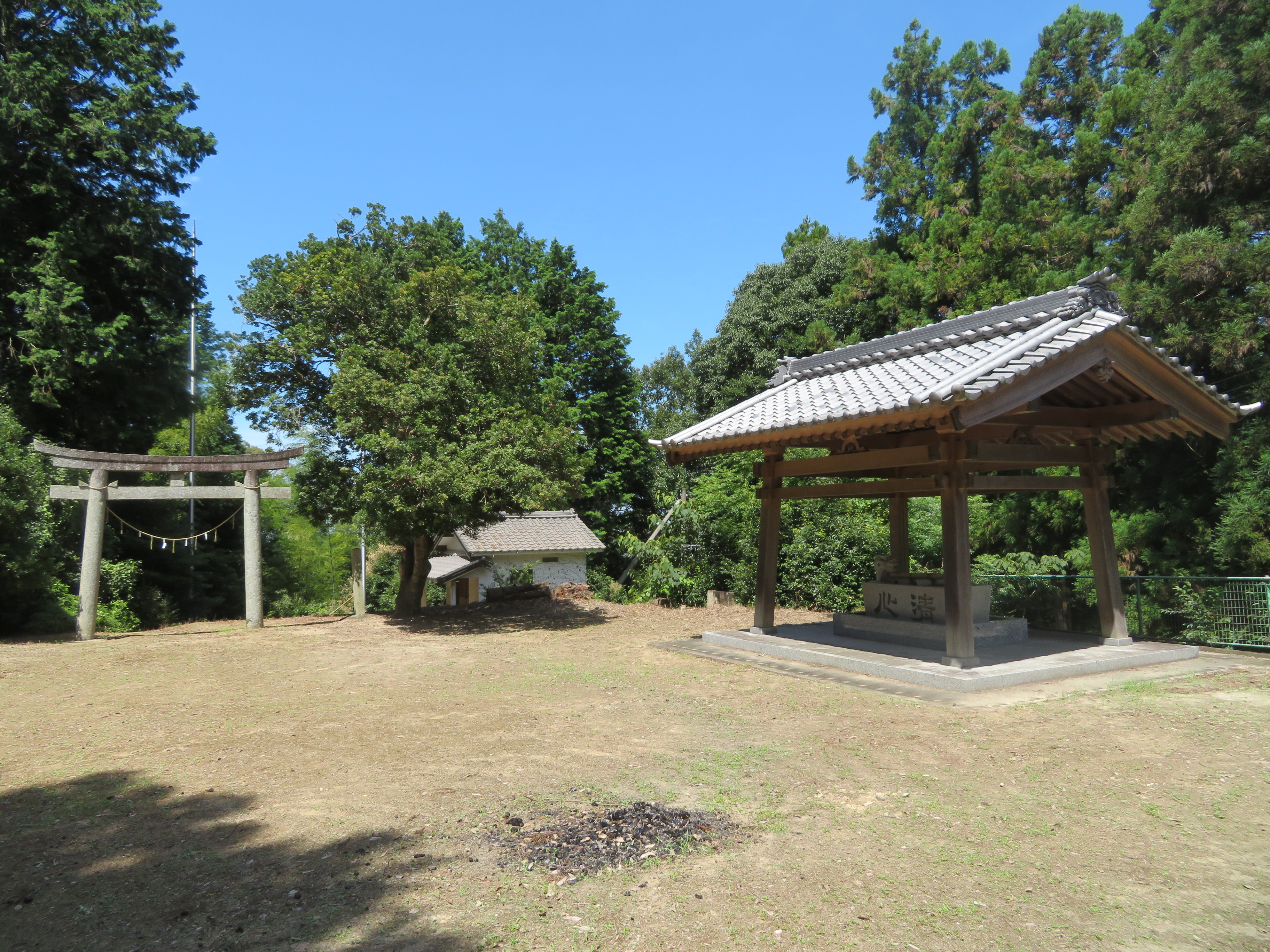 村積神社下宮（岡崎市奥山田町）